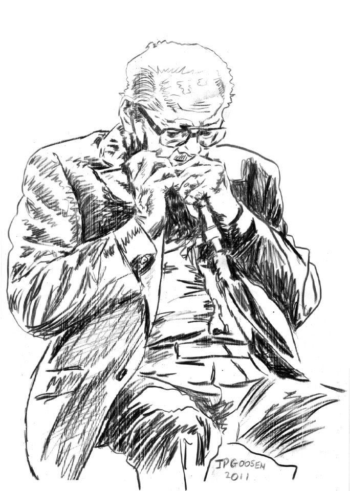 Charcoal sketch of Toots Thielemans by RSA artist Japie Goosen